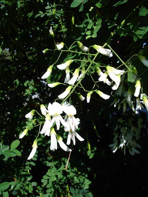 Cladrastis kentukea